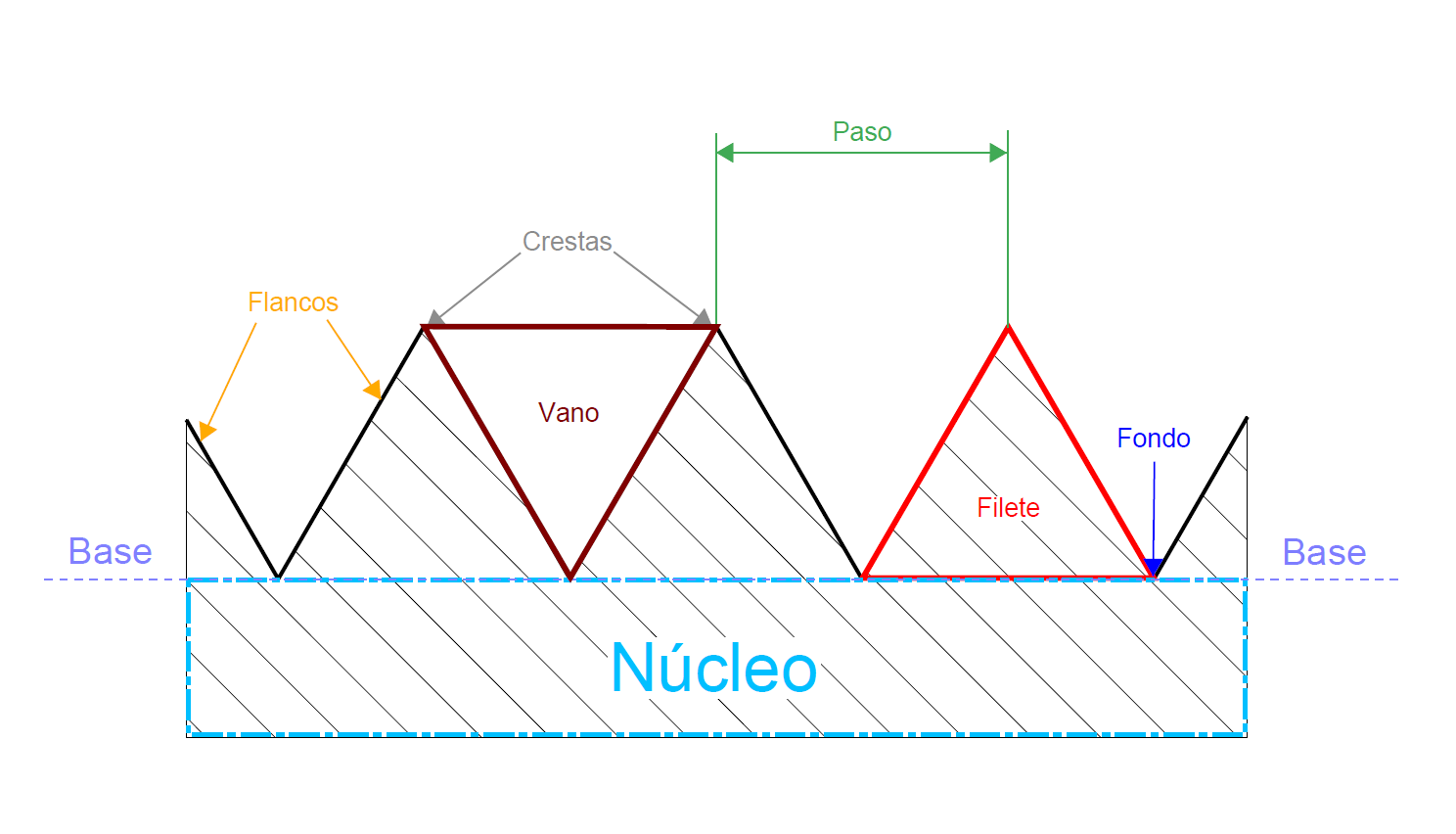 Las diferentes zonas que componen una rosca.